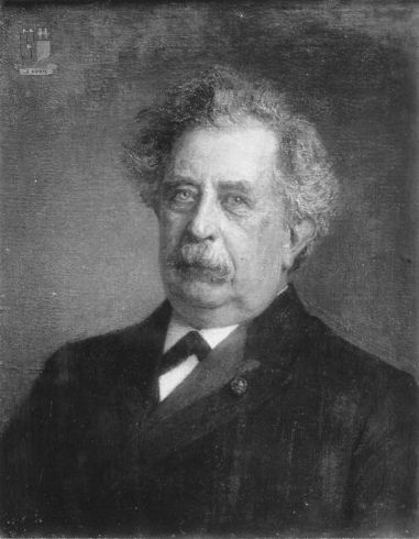 Portret van Jan Hudig (1838-1924), lid van de firma Hudig & Blokhuyzen, cargadoors te Rotterdam, oprichter en lid van de firma Hudig & Veder, reders aldaar, wethouder en consul van Italië te Rotterdam, lid van de Provinciale Staten van Zuid-Holland. In 1909 door de burgemeester en anderen aan Hudig aangeboden ter gelegenheid van diens 40-jarig lidmaatschap van de gemeenteraad, tot plaatsing in Museum Boijmans van Beuningen. Foto: Museum Boijmans Van Beuningen.